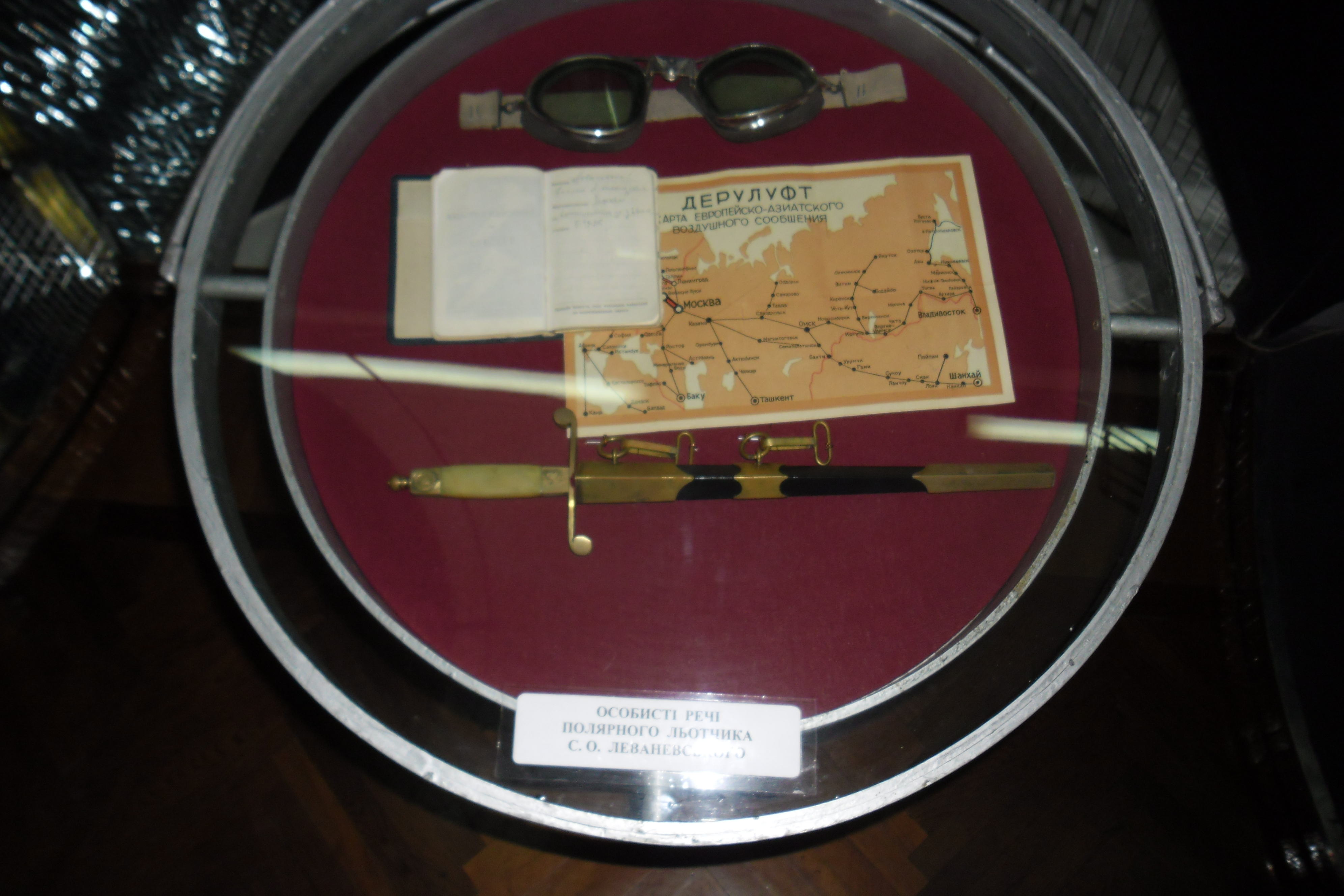 Фото